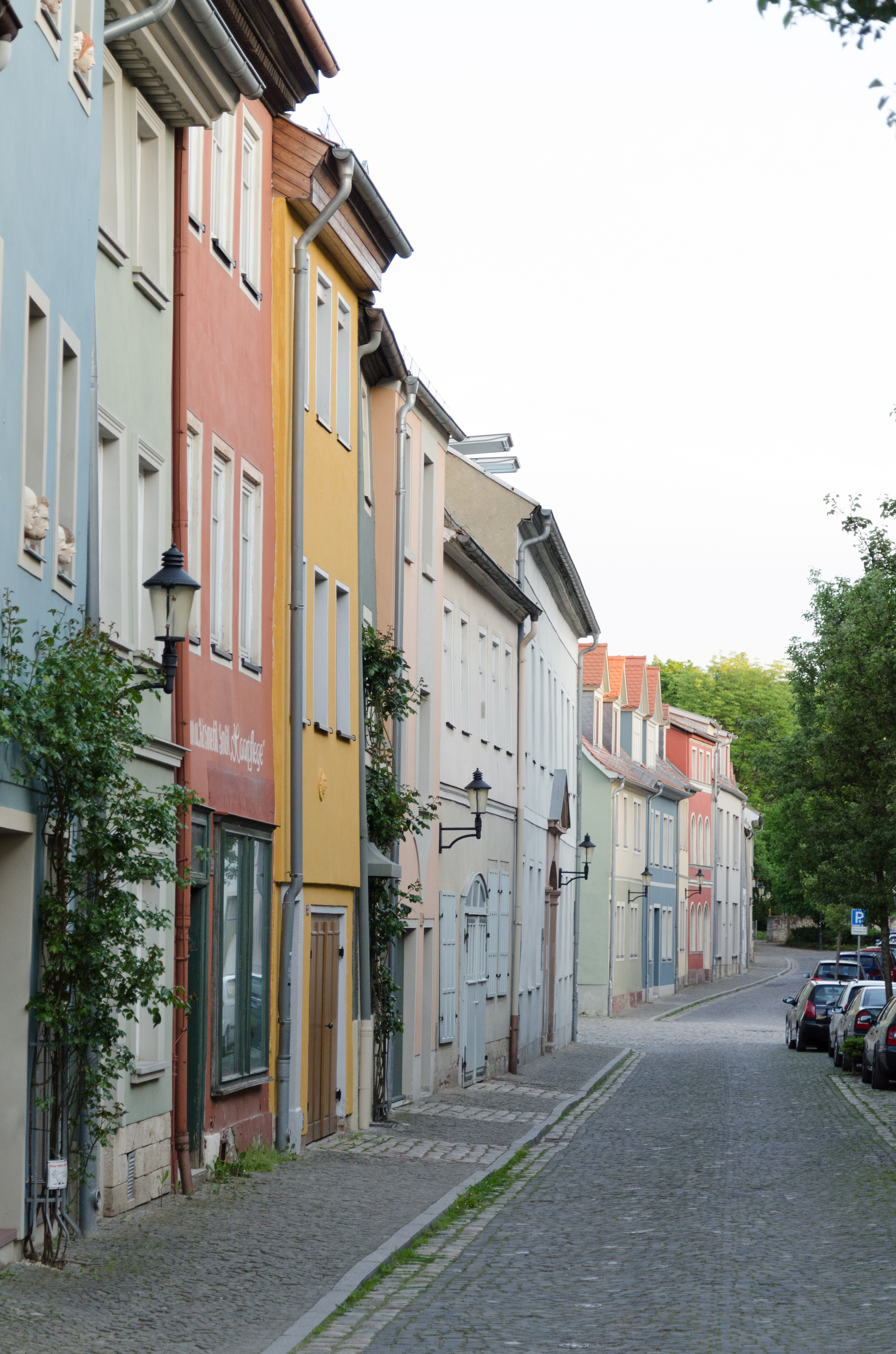 Naumburg, Weingarten, Ostseite